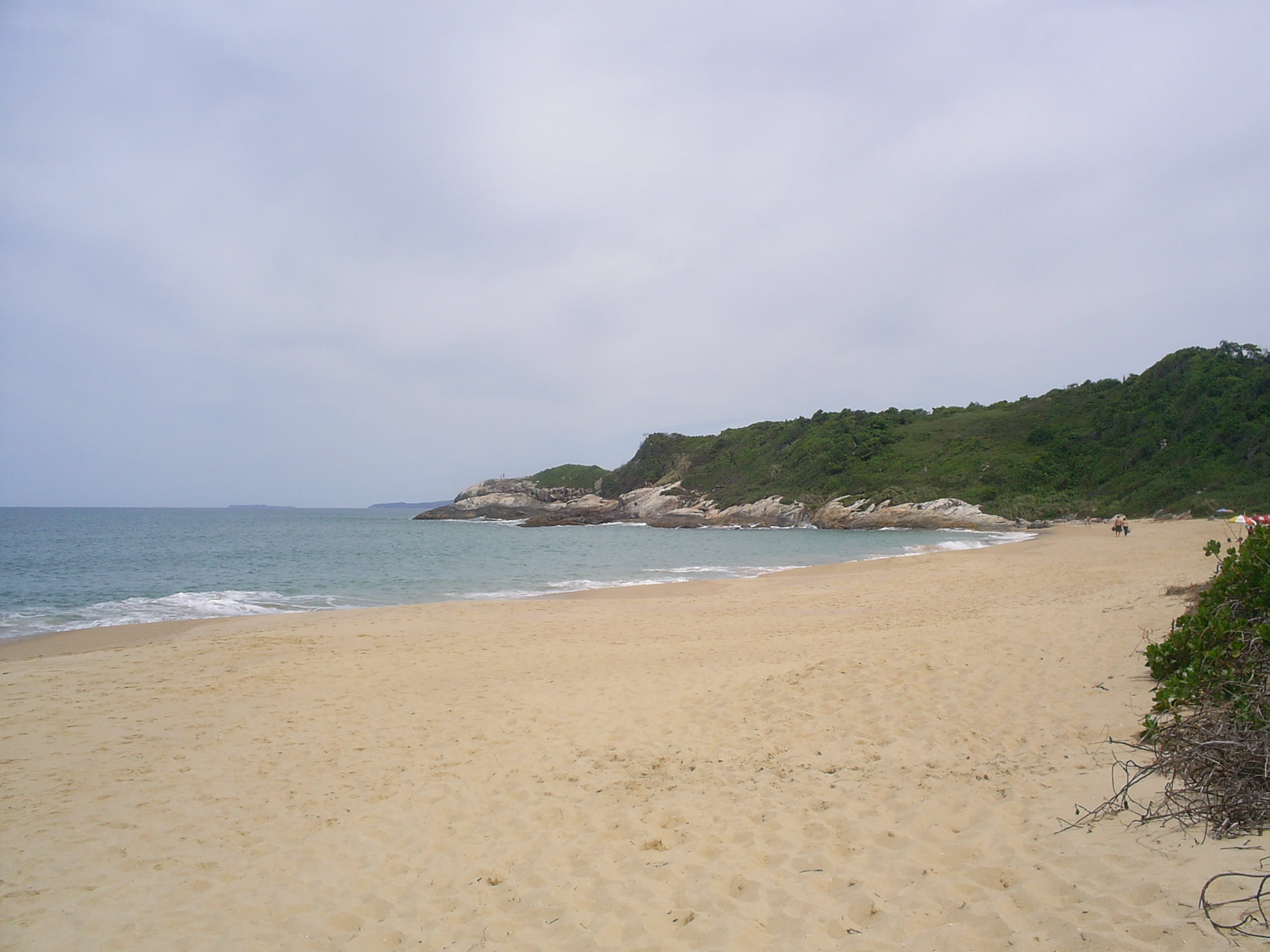 Praia do Pinho - Foto de 02/11/2005 - Autor André Herdy